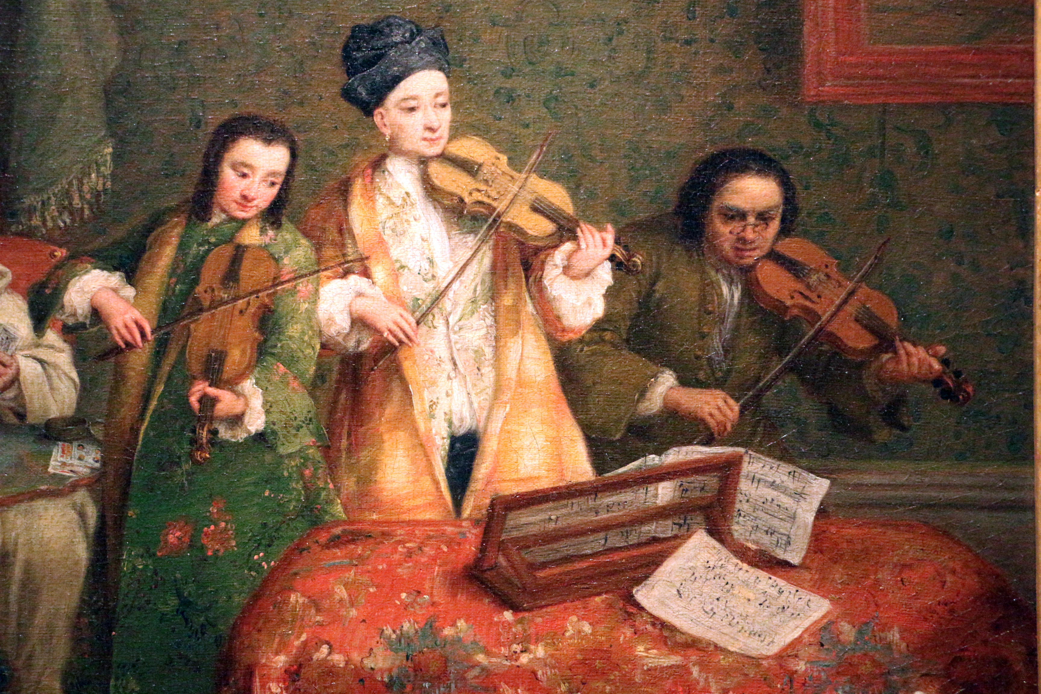 Gallerie dell'Accademia This is a photo of a monument which is part of cultural heritage of Italy.